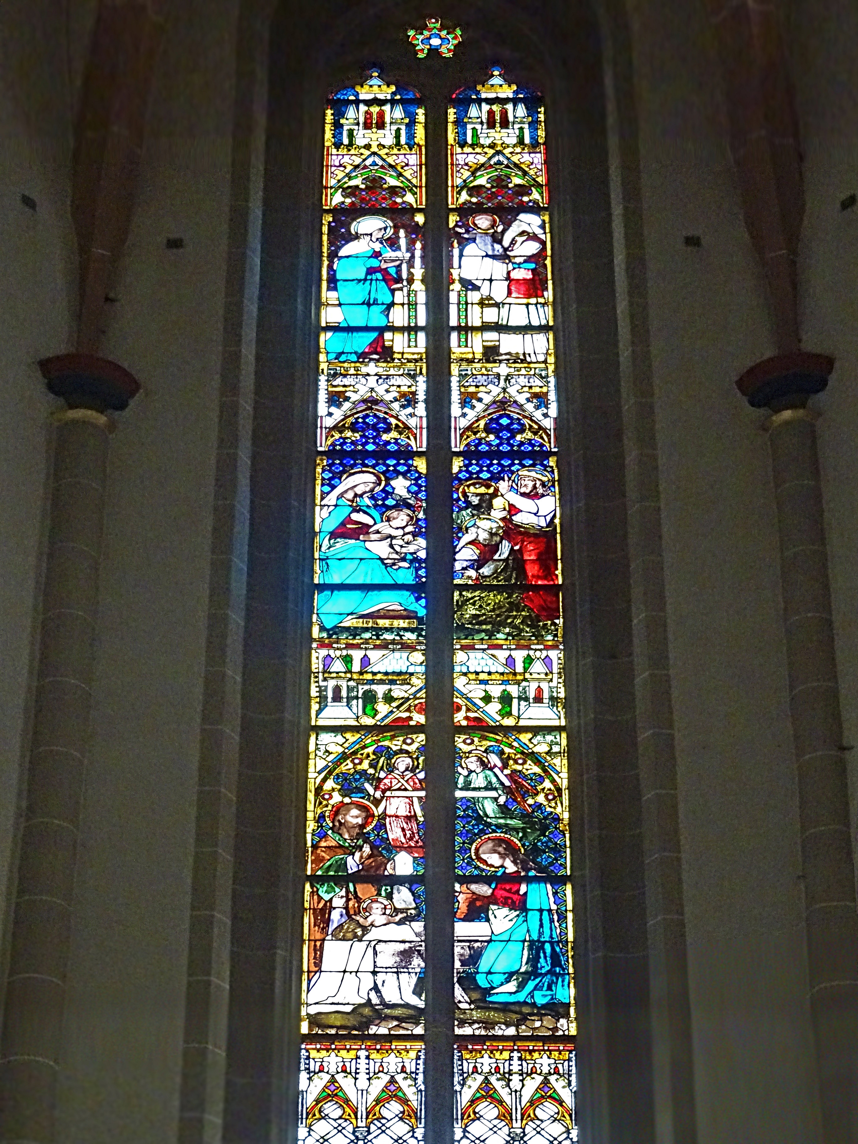 mittleres Chorfenster (1883, Geburt Jesu / Anbetung der Könige / Maria Reinigung) in der Pfarrkirche St. Gertrud (Dingelstädt)